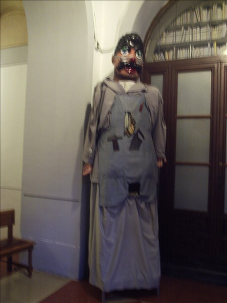 Gigantes de Alcalá de Henares